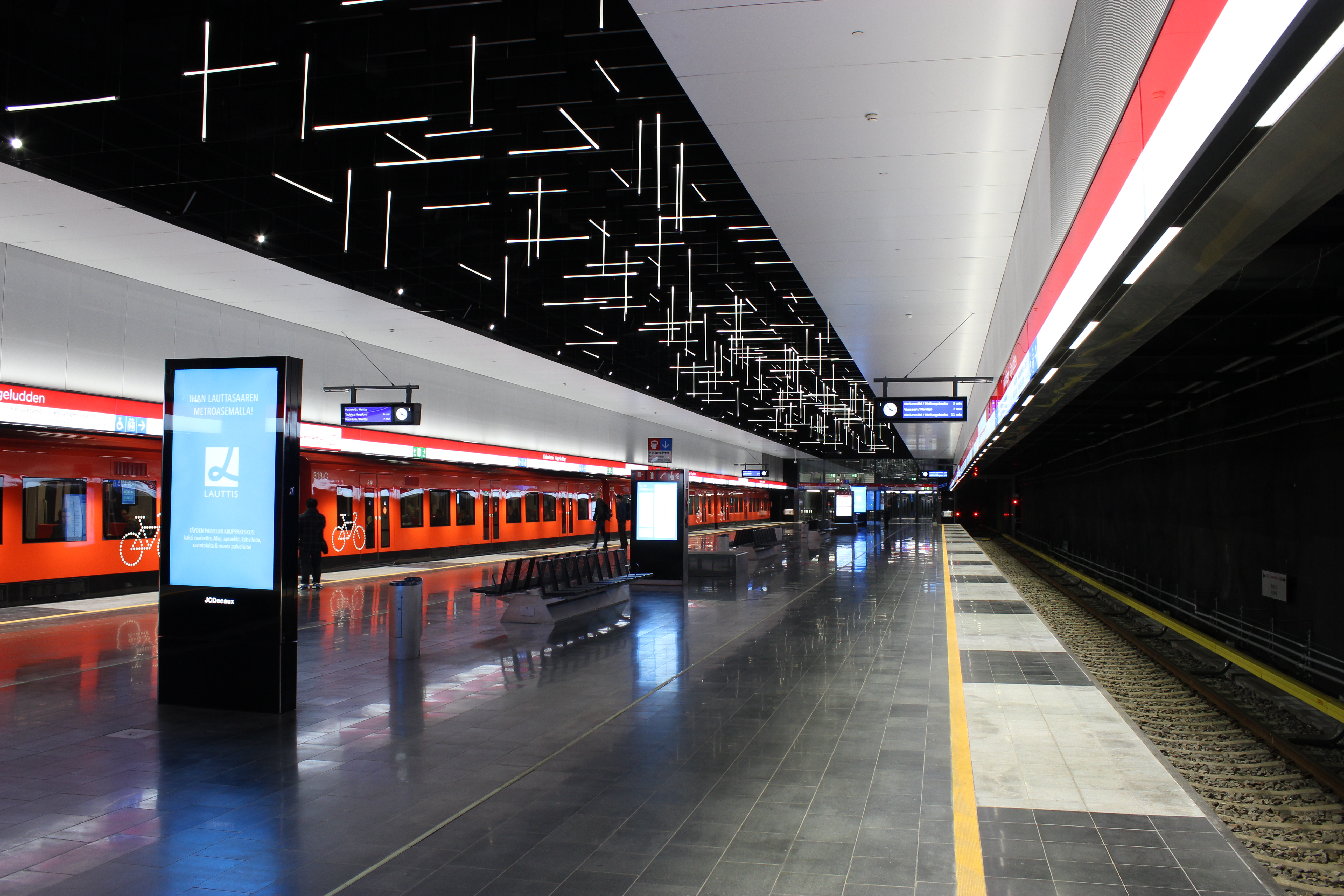 Keilaniemen metroasema marraskuussa 2017.